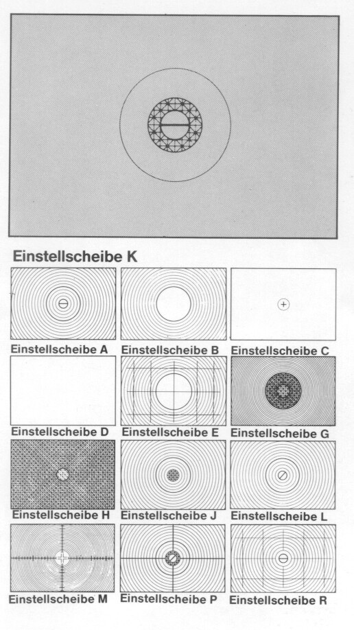 Nikon F2 Einstellscheiben/focussing screens